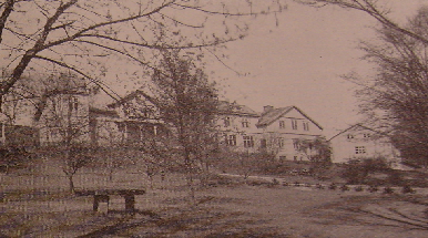 Nuvarande skolhus, byggt 1907 med tillbygnader